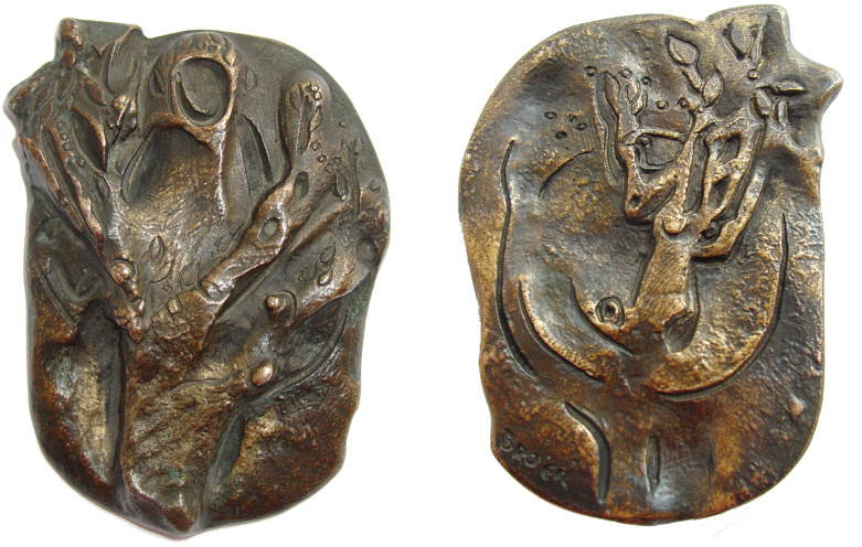 Dr-Irmgard-Woldering-Förderungspreis der Numismatischen Gesellschaft zu Hannover mit der Darstellung der Daphne, Bergnymphe der griechischen Mythologie und Priesterin der Mutter Erde. Laut chemischer Analyse aus einer Art Rotguss (CuSn7Zn2, „gunmetal“, Zwischenform von Bronze und Messing, bronzefarben; Maße 9,5 x 7,1 x 1,6 cm)